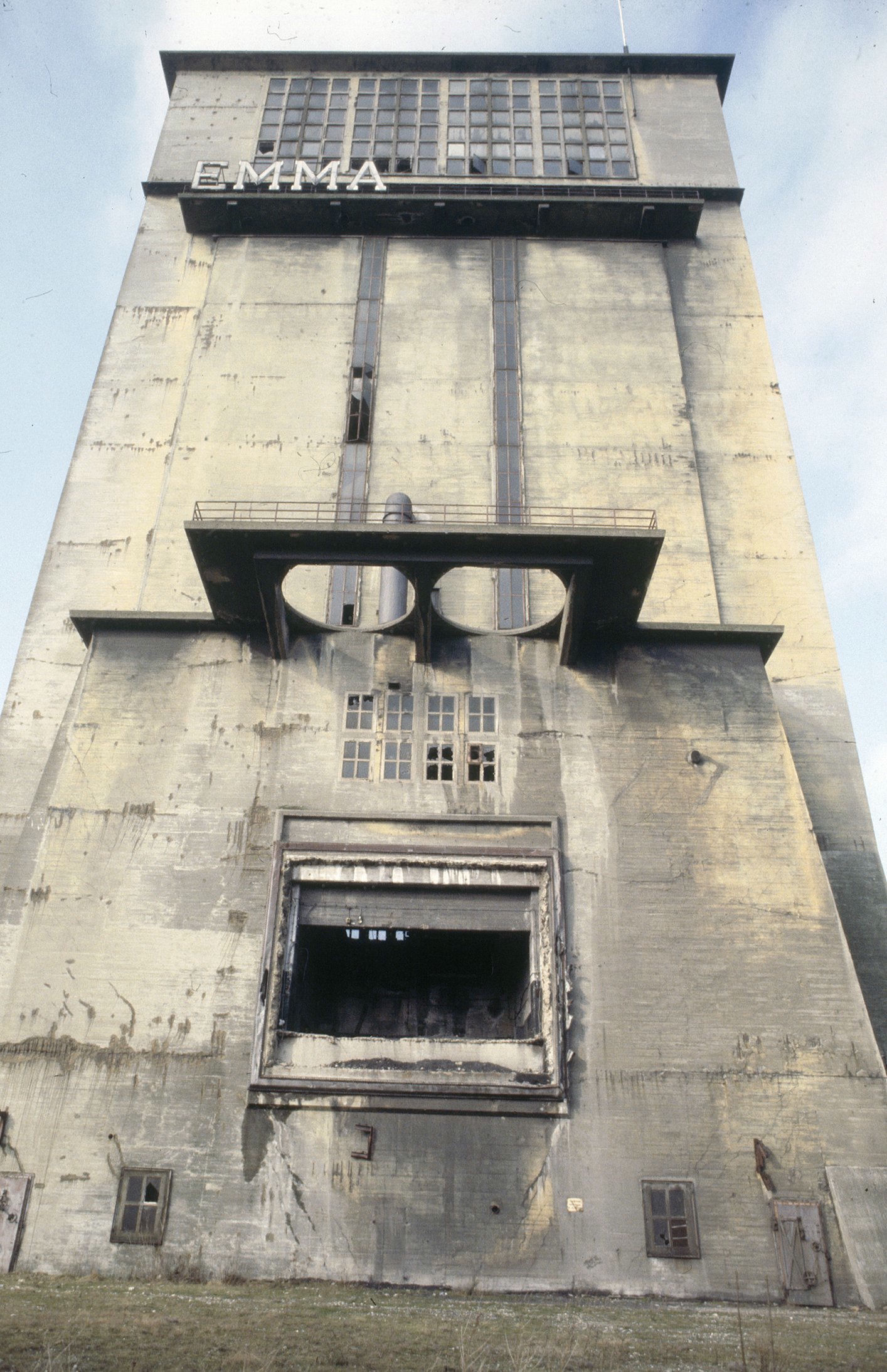 Staatsmijn Emma: Exterieur BETONNEN SCHACHTGEBOUW, SCHACHT III, GEVEL. Gesloopt 28 Oktober 1983